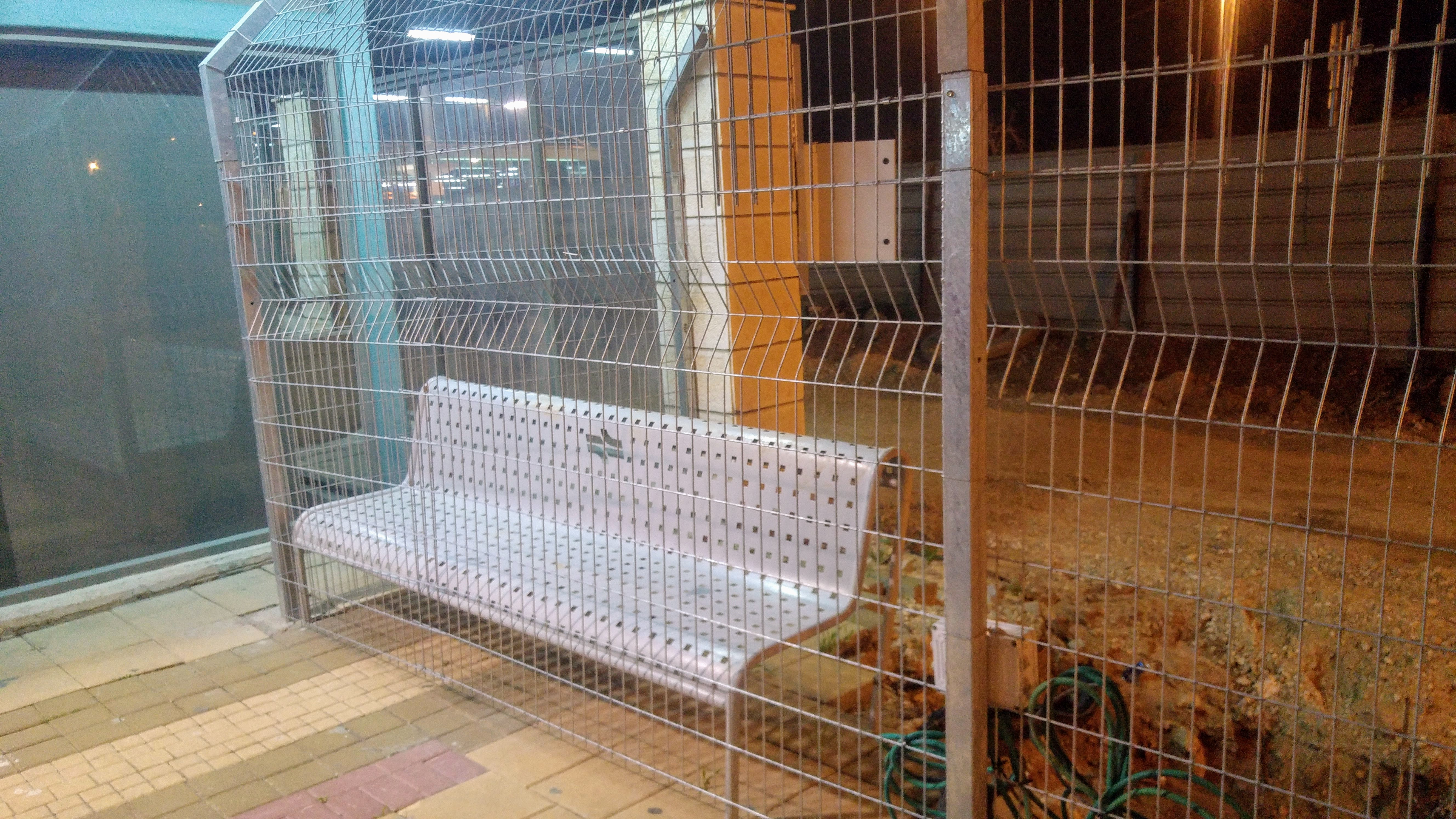 ספסל מחוץ לגדר בתחנת הרכבת קיסריה פרדס חנה במהלך השיפוצים אזור מזרחי